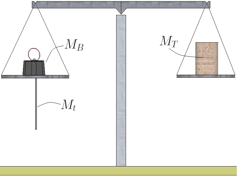 Mesure de la densité relative d'un corps solide (Site " Fascicules de physique. LEZE-LEROND ".)